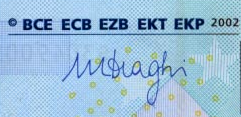 20€ Draghi